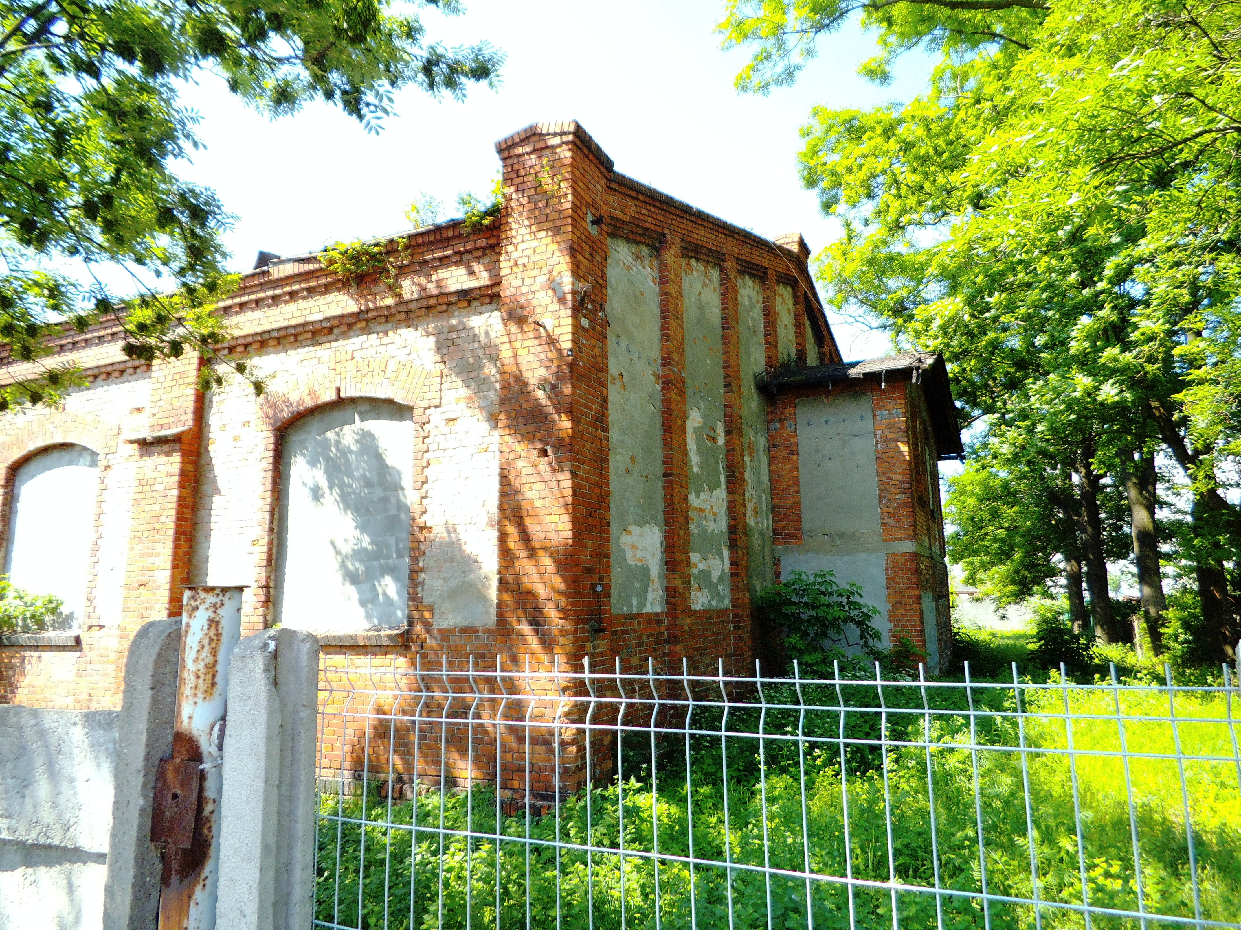 Dawna ujeżdżalnia koni w Toruniu1